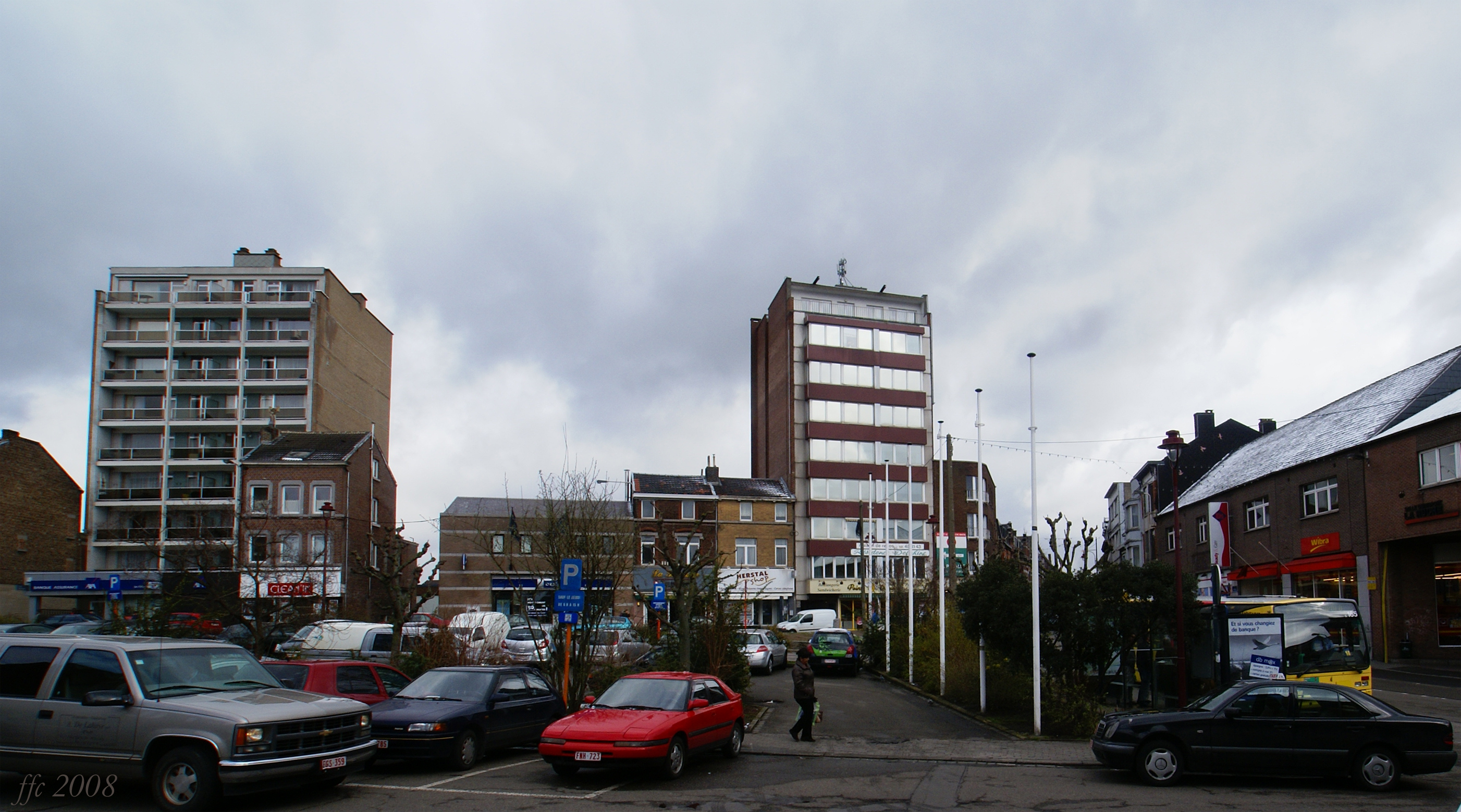 Herstal (Belgium) City square: place Jean Jaurès Plaça major o Place Jean Jaurès Place Jean Jaurès